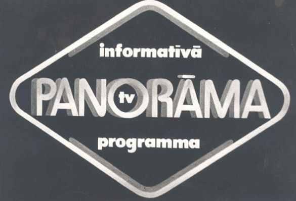 Скриншот заставки программы "Panorama" 1958 г.